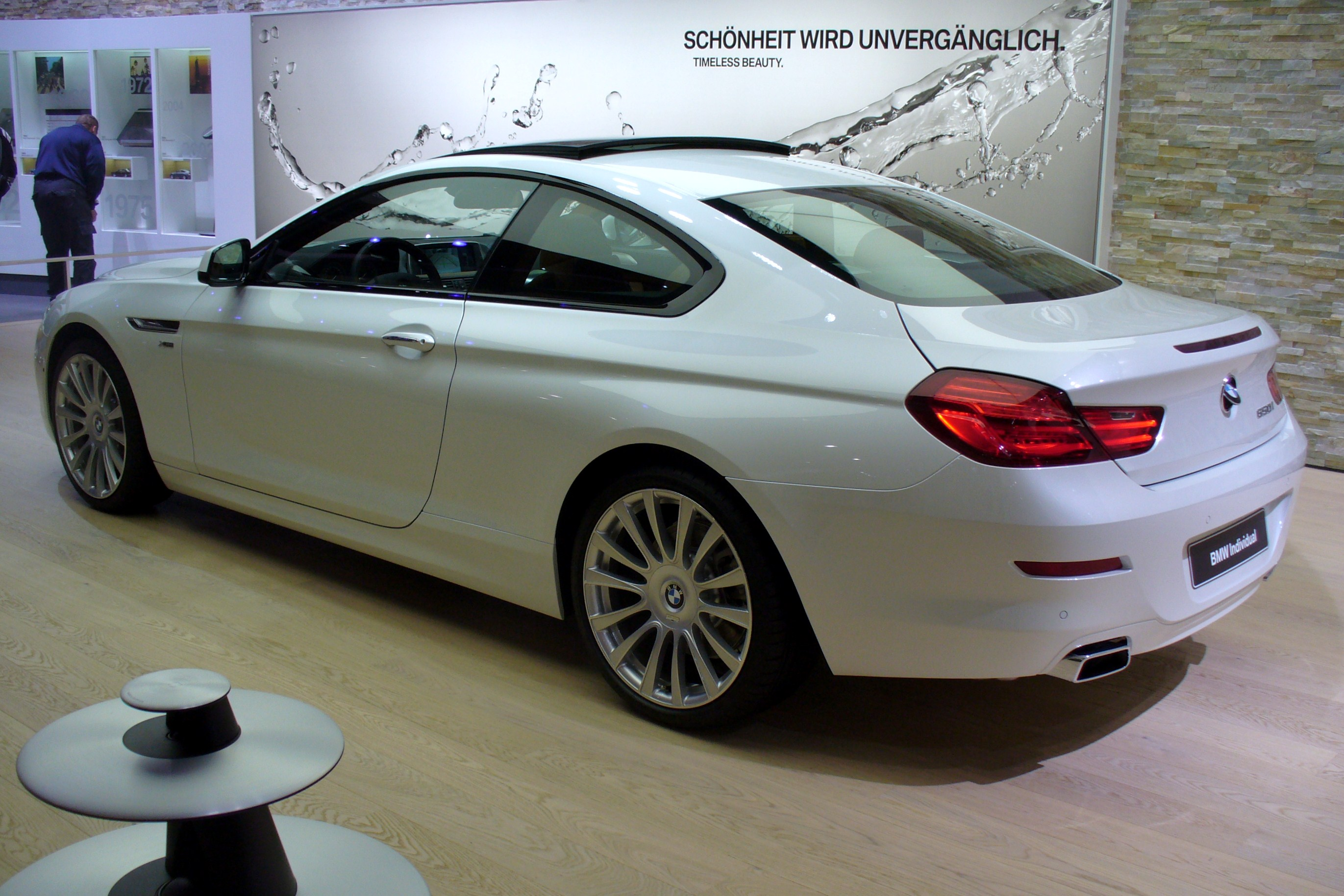 BMW 650i xDrive Coupé